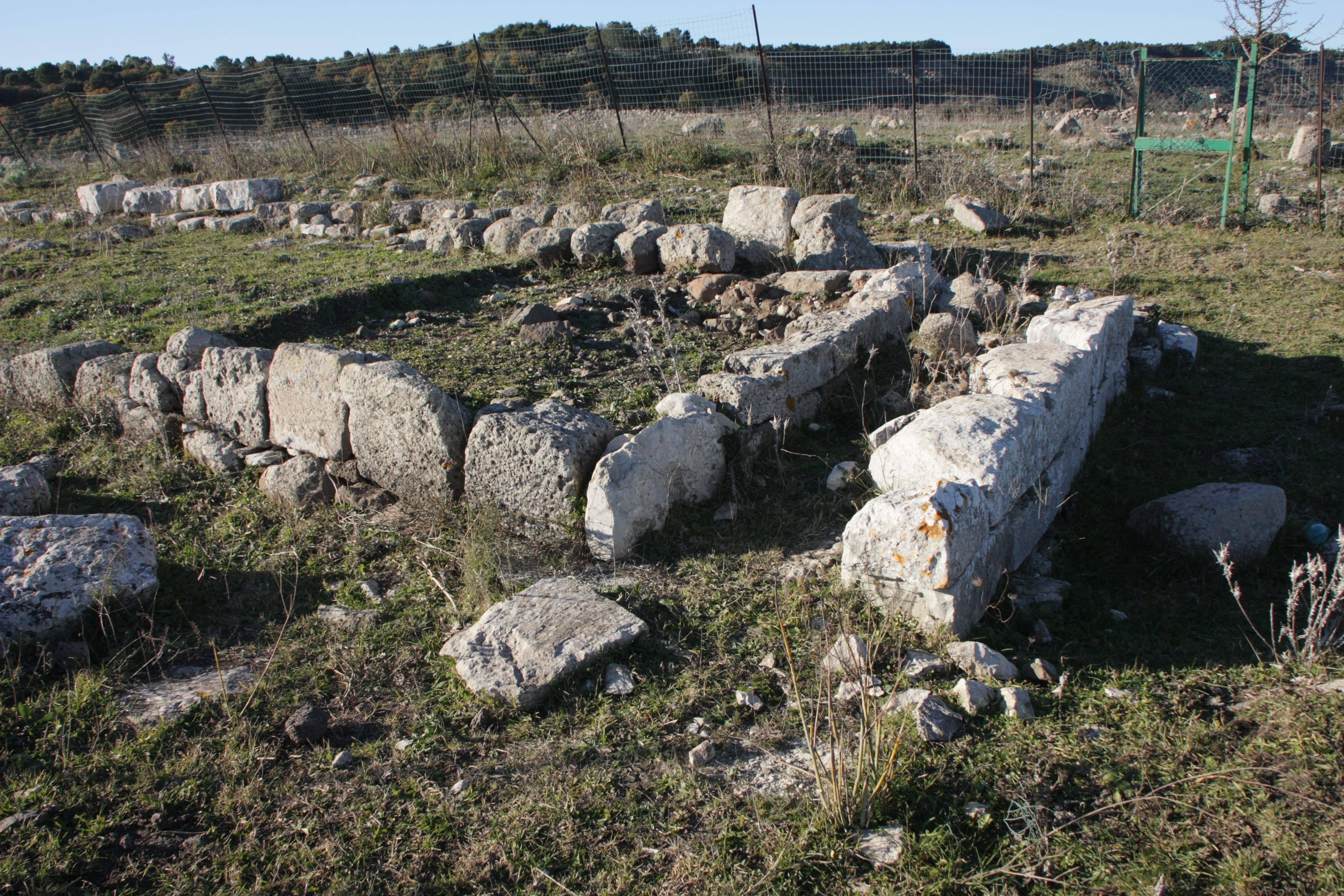 Tempio